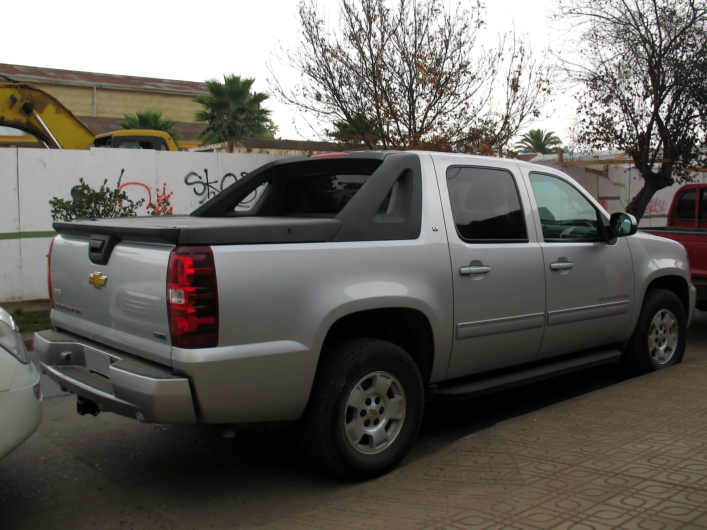 Chevrolet Avalanche LT 2010